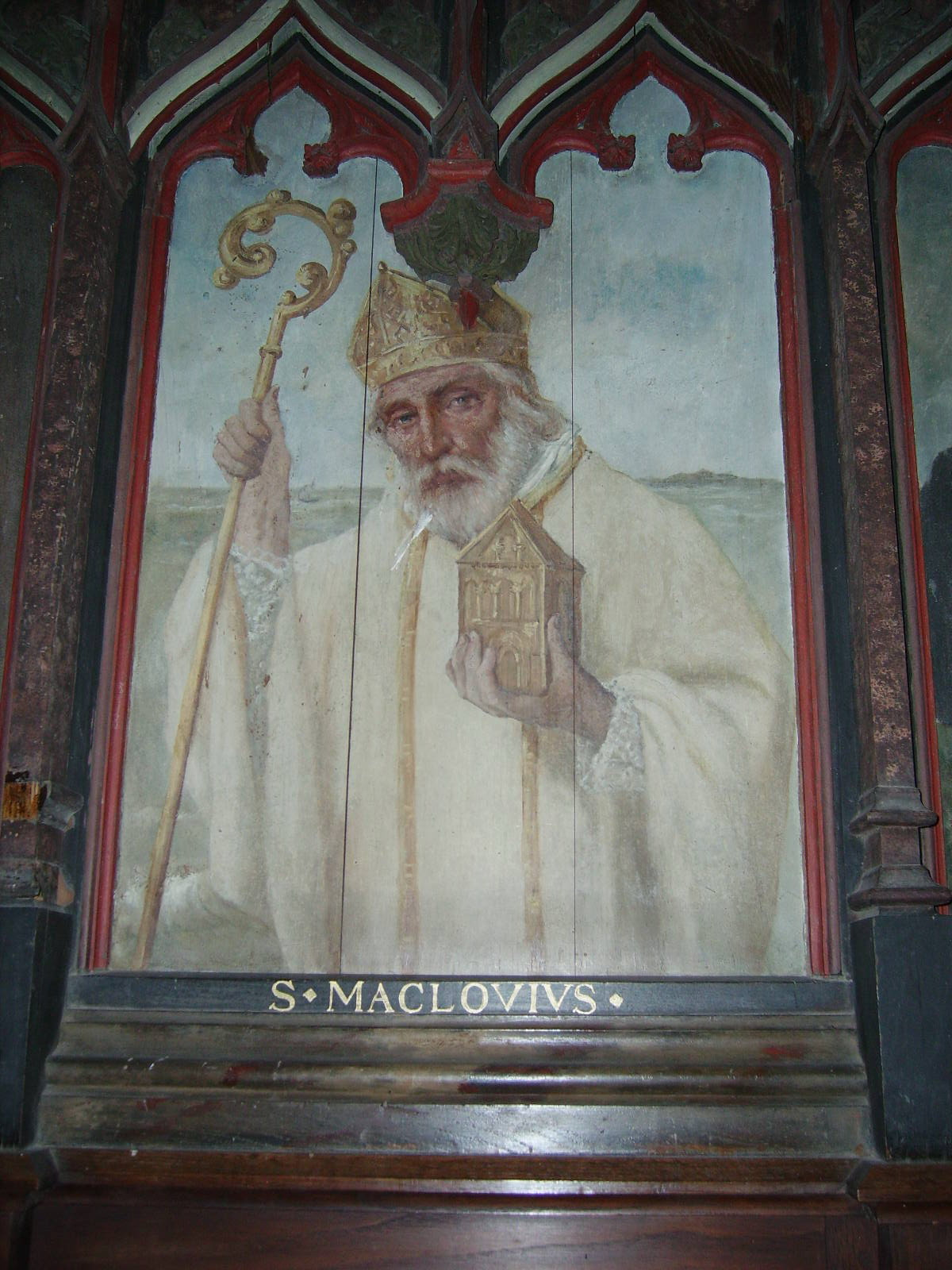 Sankta Malo. Pentraĵo en la preĝejo de Léhon.